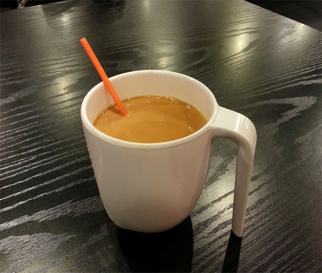 快餐店的奶茶